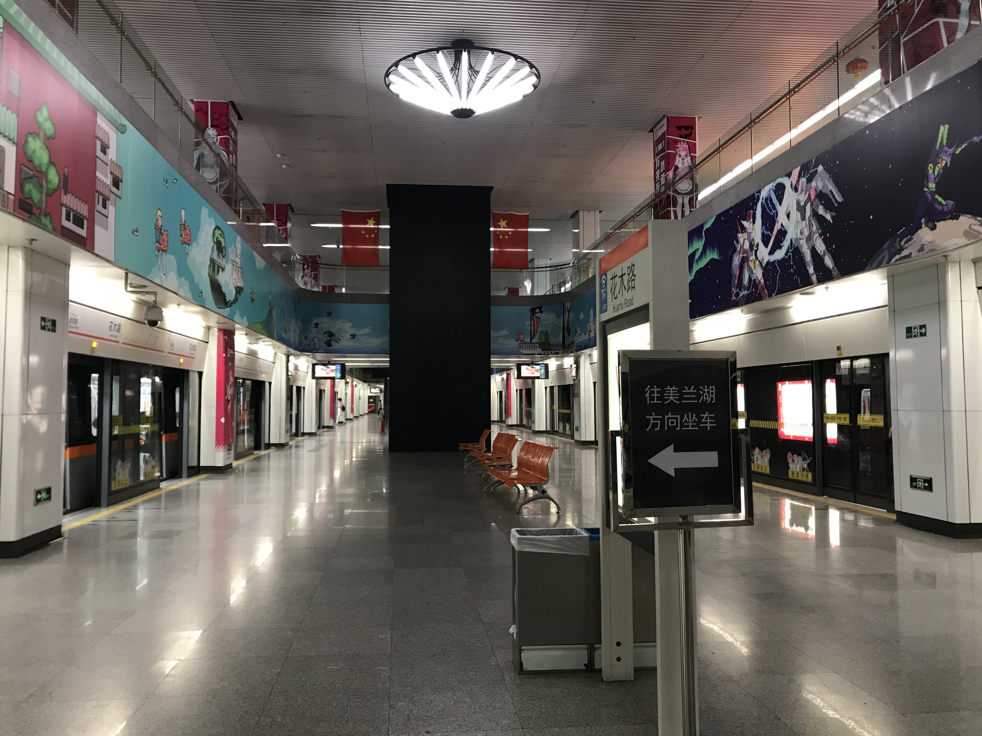 花木路駅のホーム